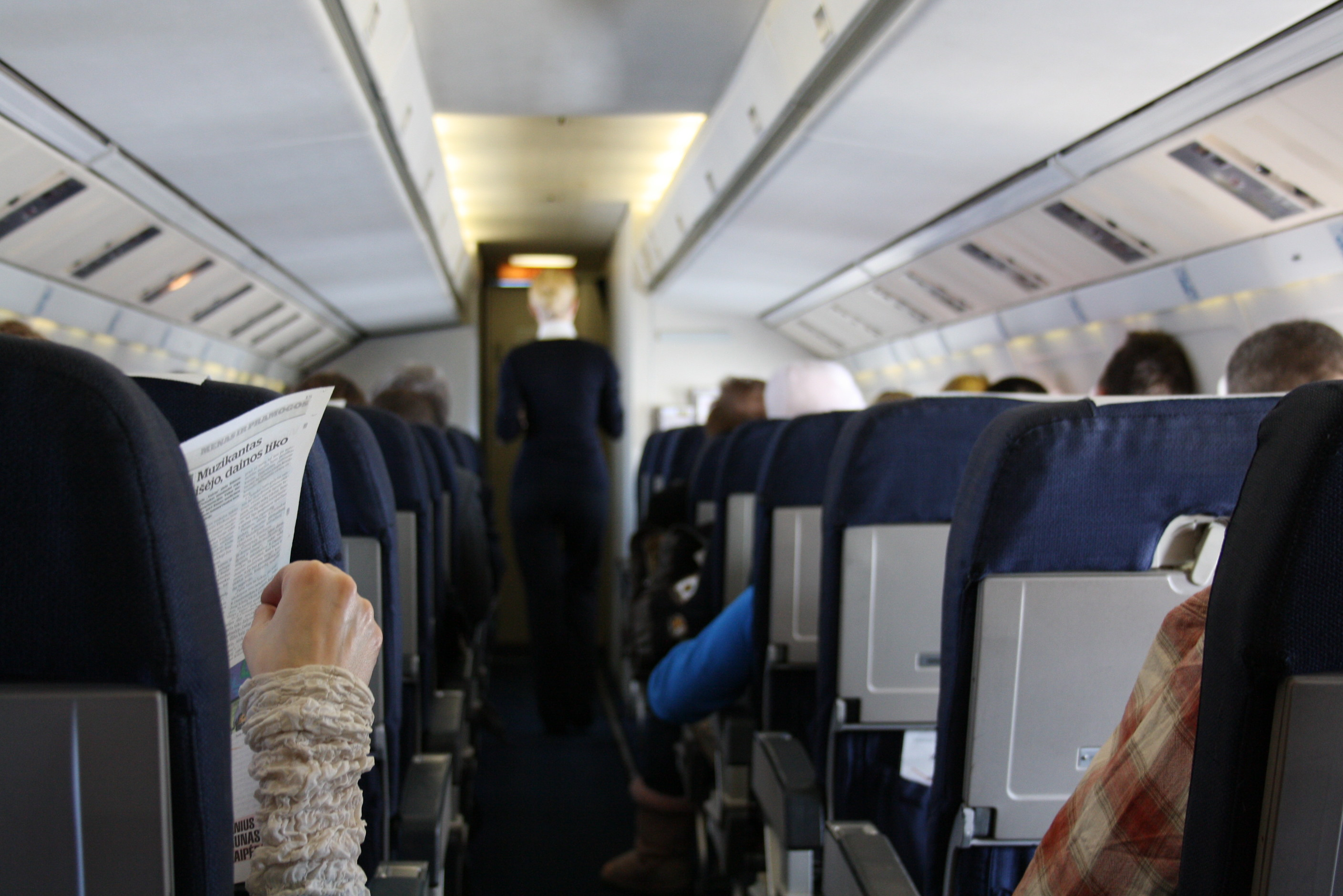 Innenraum der Fokker 50 Baltic Air